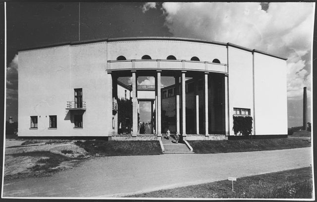 Viipurin taidemuseo